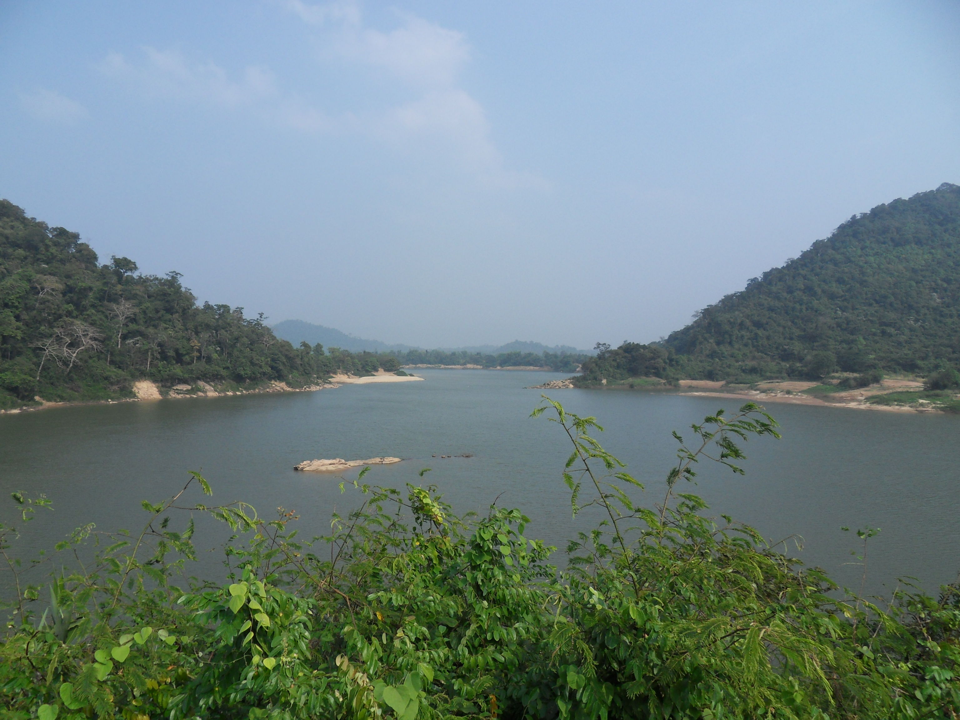 La Nam Kadding à Pak Kadding.